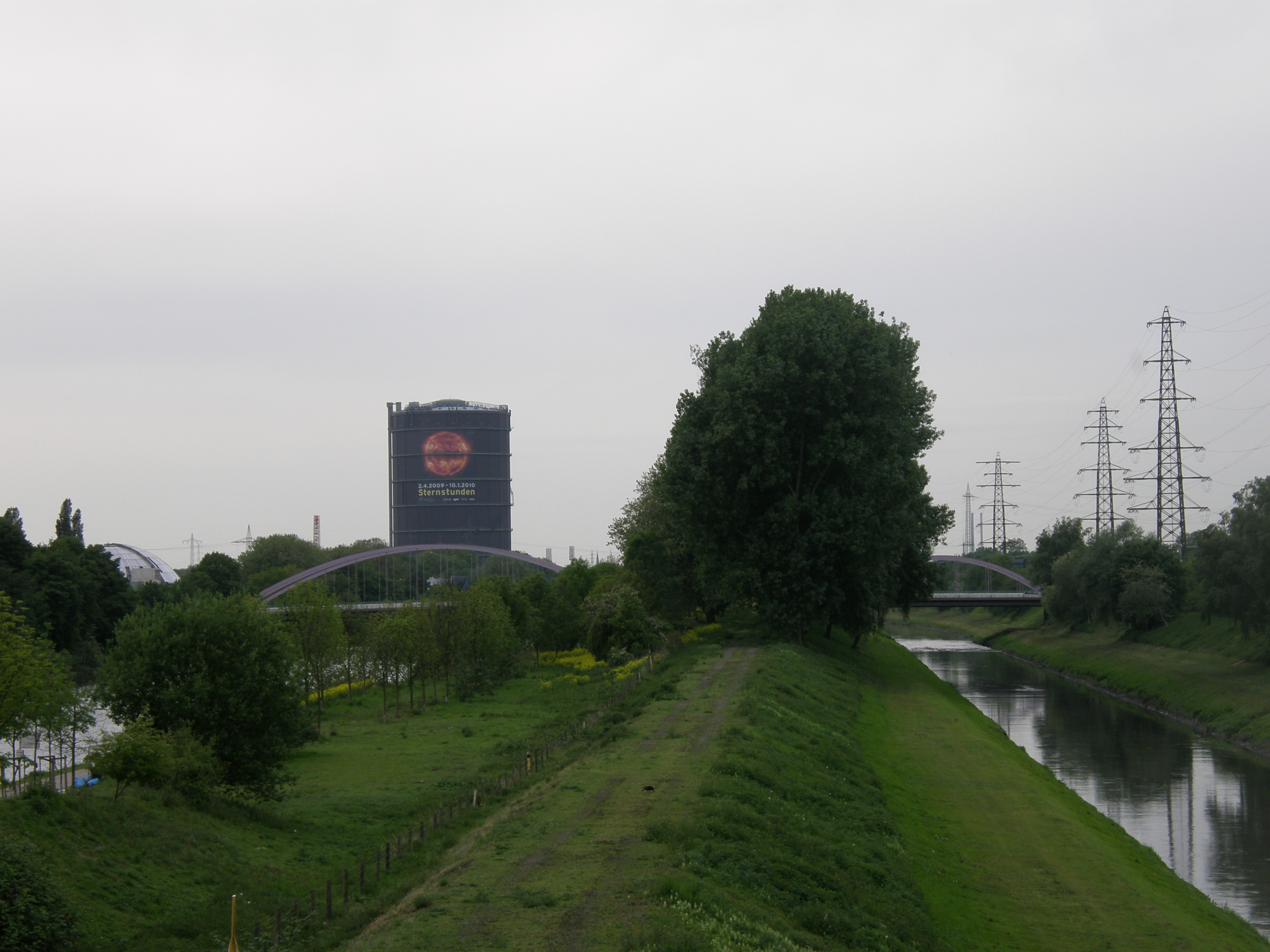 Blick auf eine der schmalsten Stellen der Emscherinsel, Oberhausen, nahe Haus Ripshorst und Läppkes Mühlenbach, links der Rhein-Herne-Kanal, rechts die Emscher, Blick auf das Gasometer, rechts Freileitung Bl. 2316 (220/110 kV)